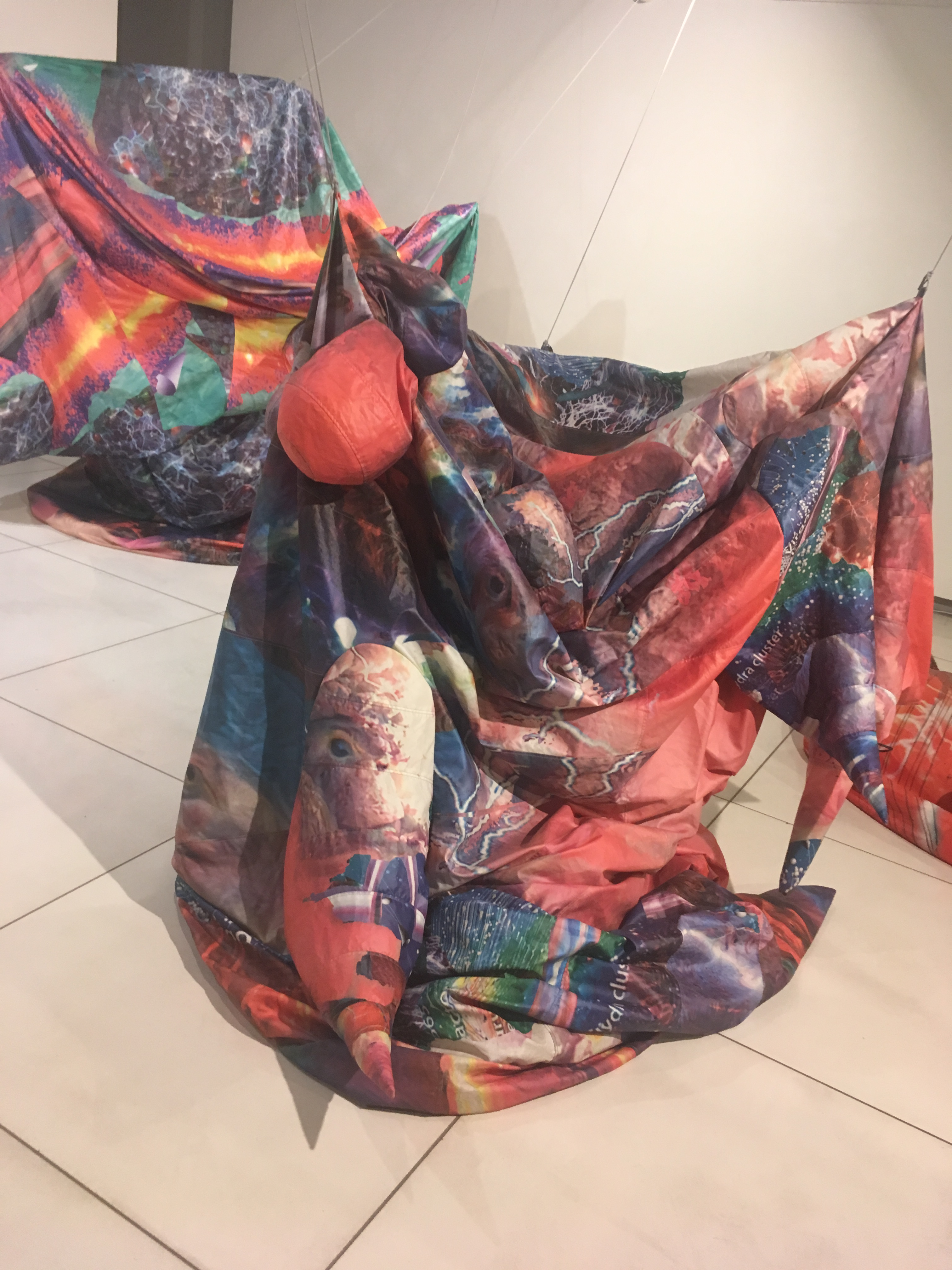 The work of Ivan Gorshkov. Exhibition "Gentle touches of digital bodies." Gallery Victoria. Curator Anastasia Albokrinova